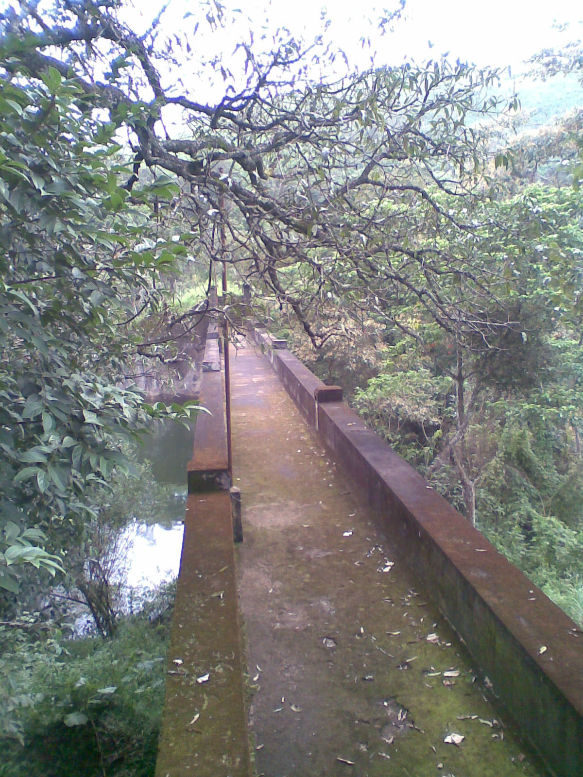 മുല്ലപ്പെരിയാർ ബേബിഡാം